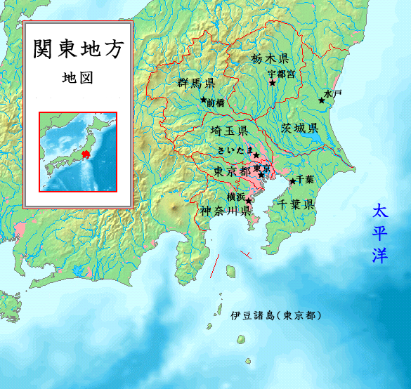 関東地方の地図である。